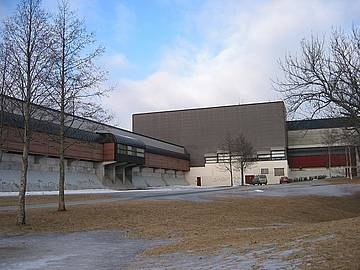 Havlaboratoriet på NTNU Tyholt